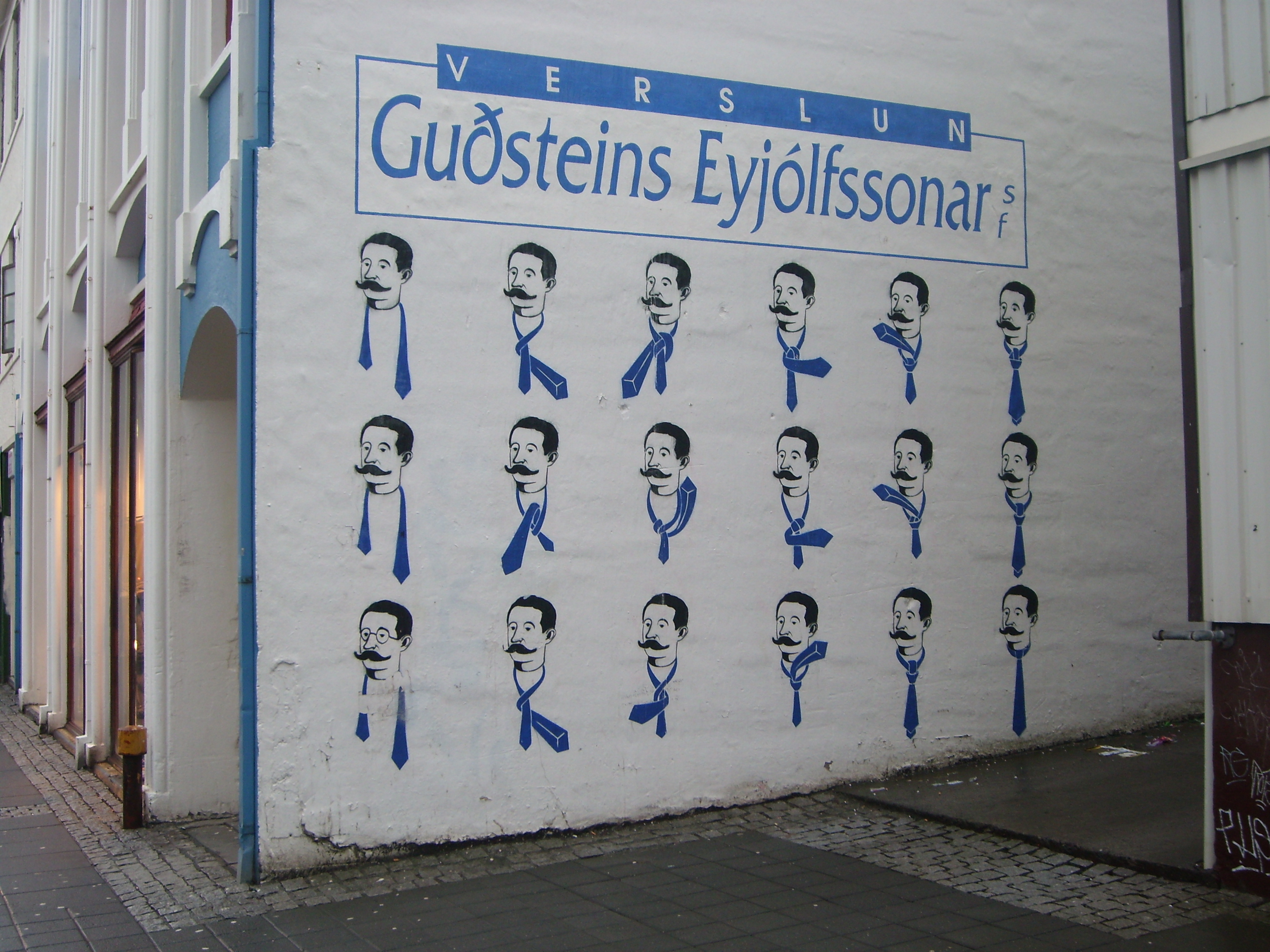 Verslun Guðsteins Eyjólfssonar